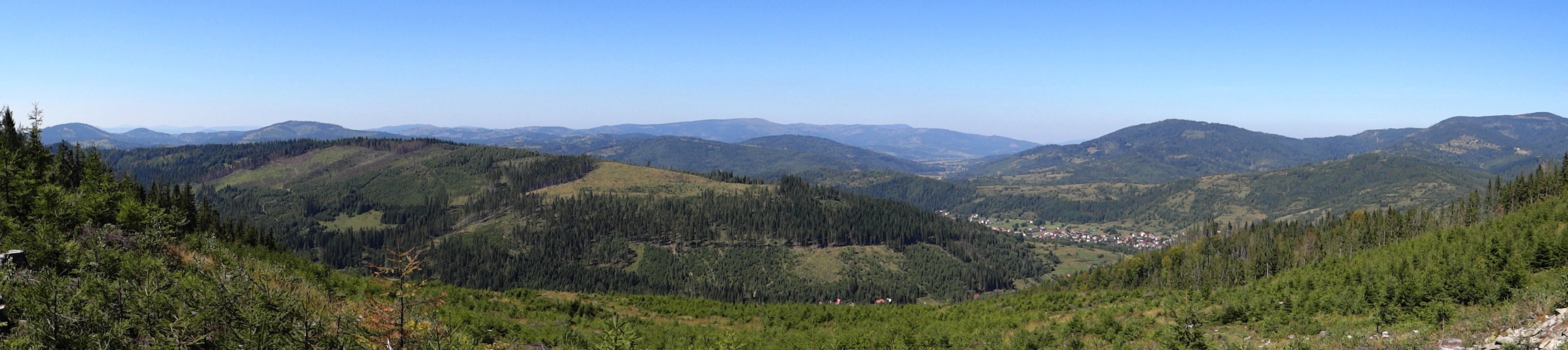 Panorama widokowa ze zboczy Muńcuła (na pierwszym planie Urówka)